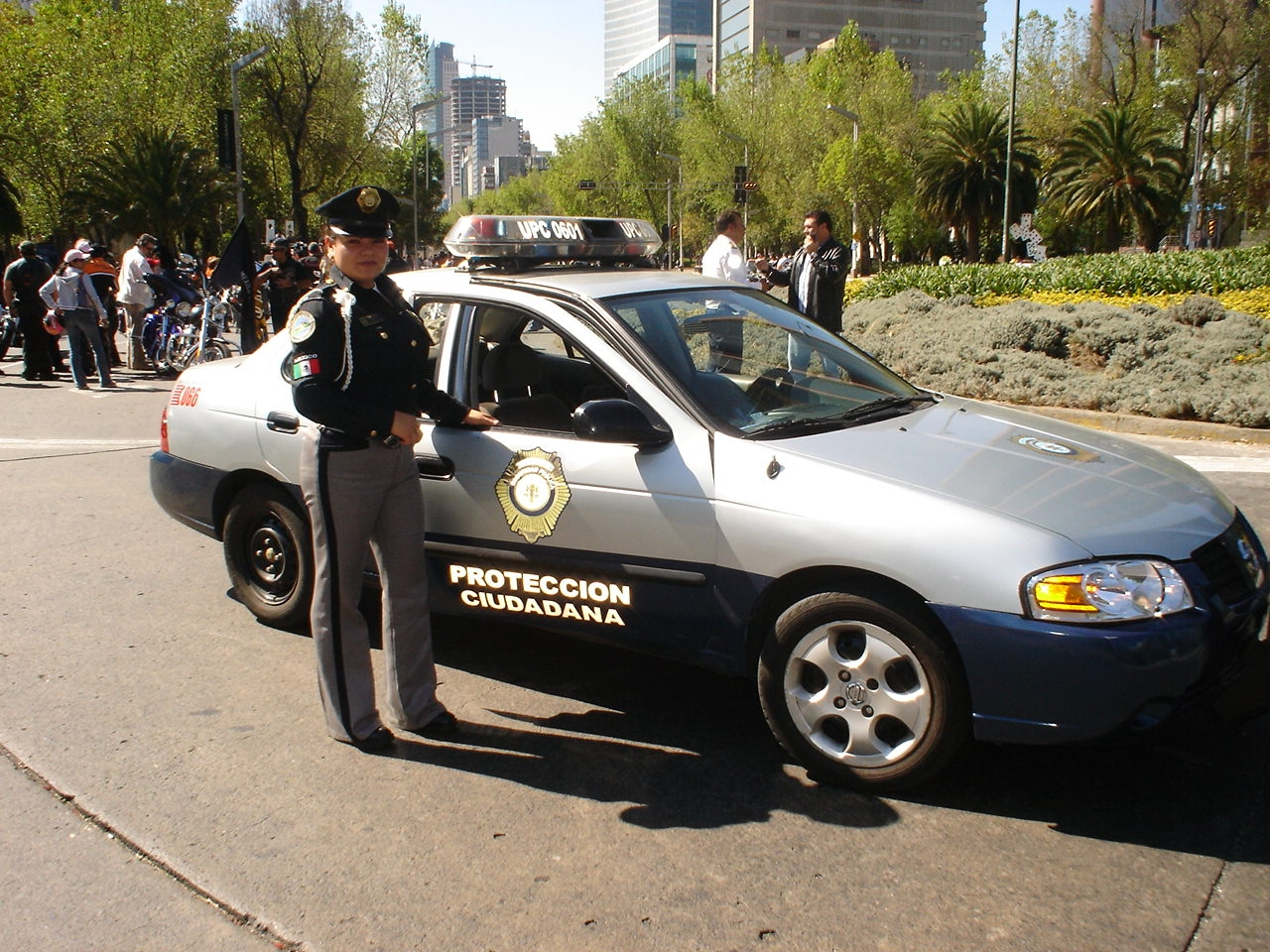 PATRULLA DE LA POLICIA MEXICANA SOBRE PASEO DE LA REFORMA